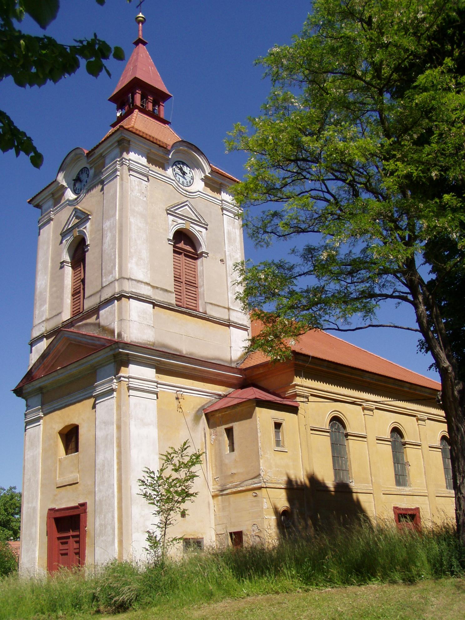 Kostel sv. Petra a Pavla (Jeníkovice)